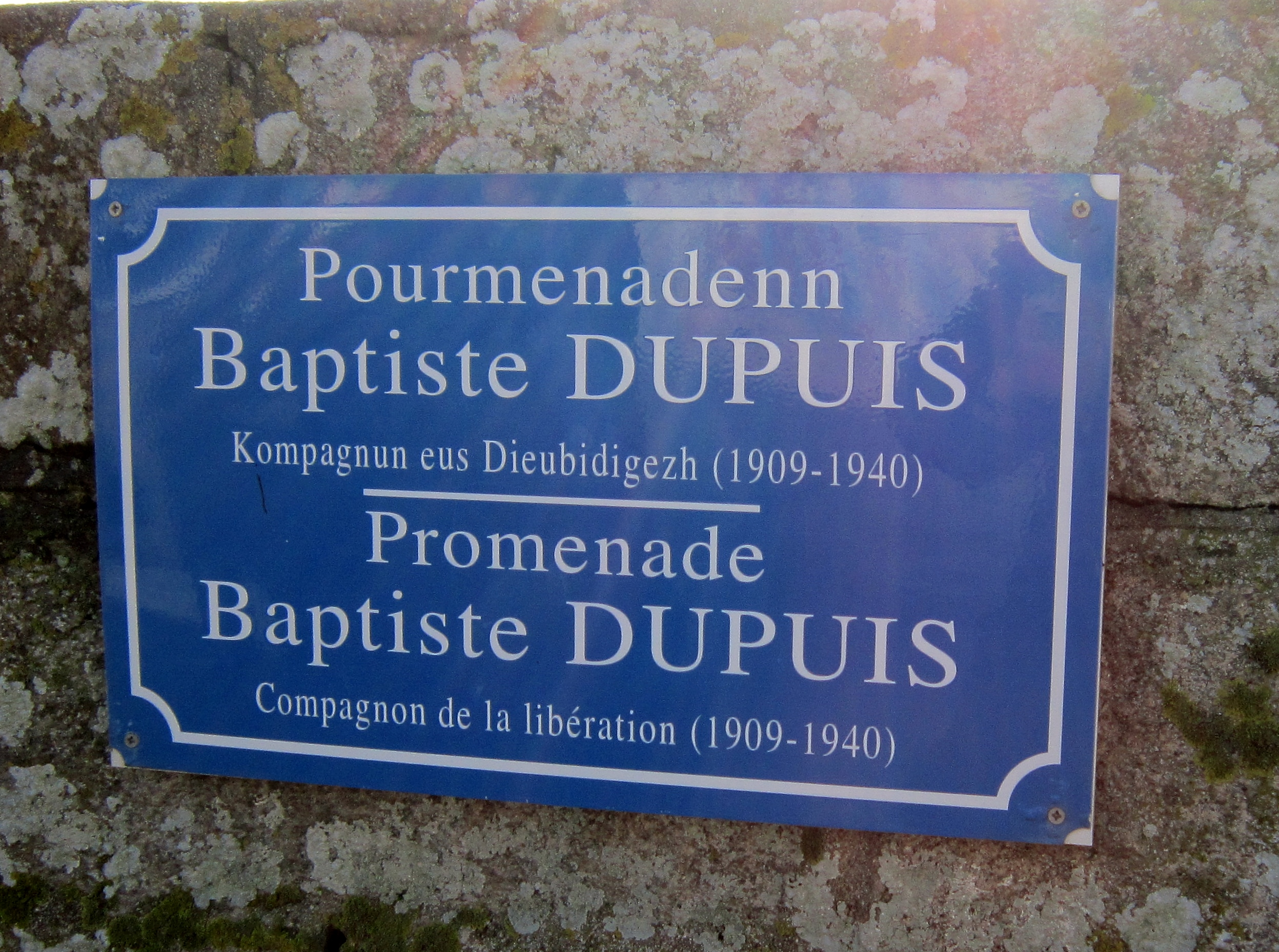 Plaque bilingue de la "Promenade Baptiste Dupuis", Compagnon de la Libération, à Saint-Guénolé (Penmarch)